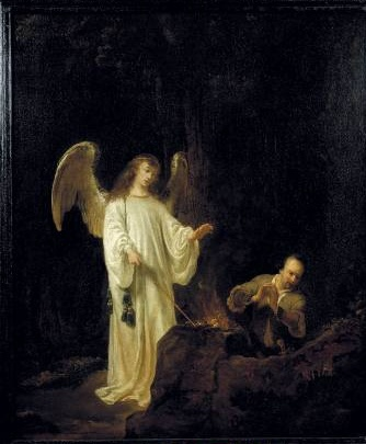 Gesigneerd en gedateerd op de steen middenvoor: Bol. fec / 1640.